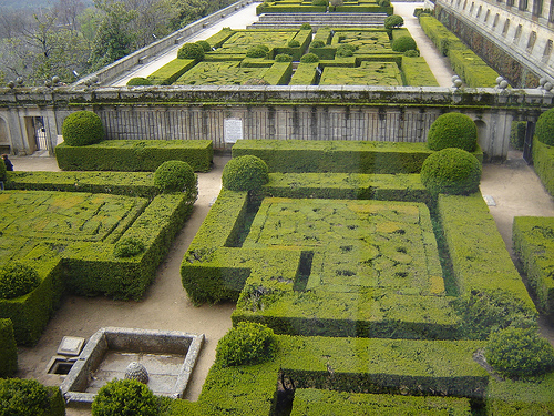 Jardín de Palacio